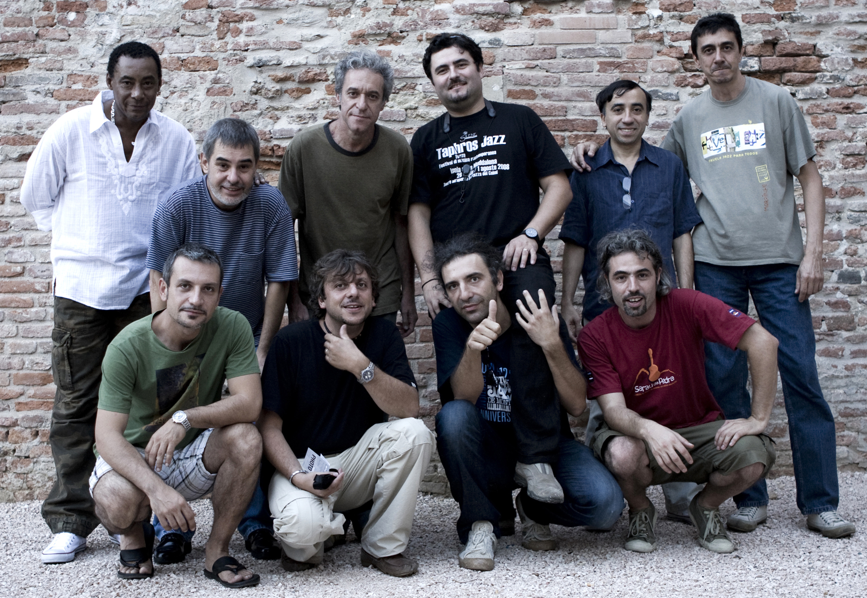 foto di guppo carioca tour